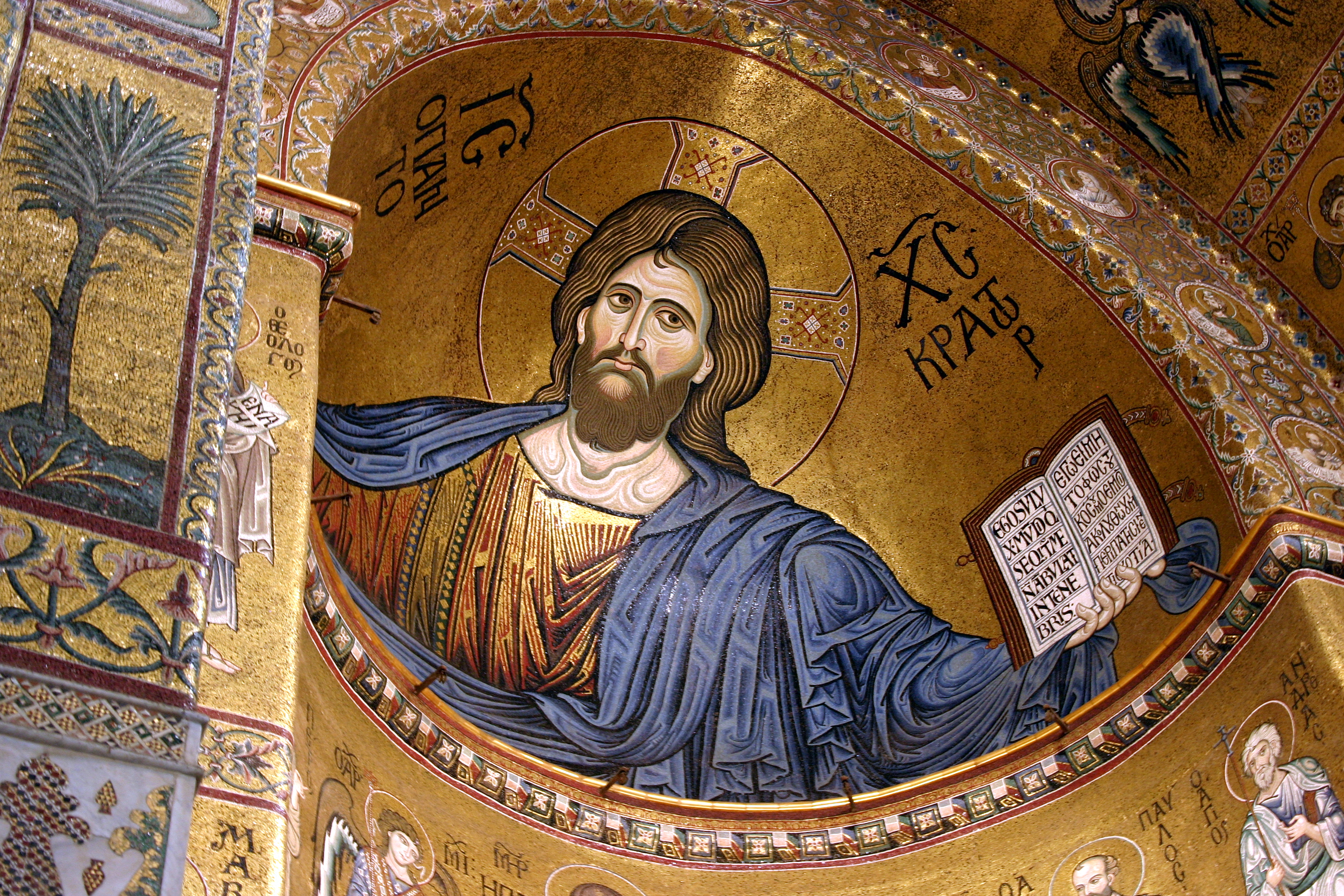 Cathedral of Monreale